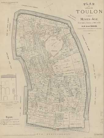 Plan en occitan de la vila de Tolon realizat epr Octave Teissier embé lei cadastres de 1442 et 1515